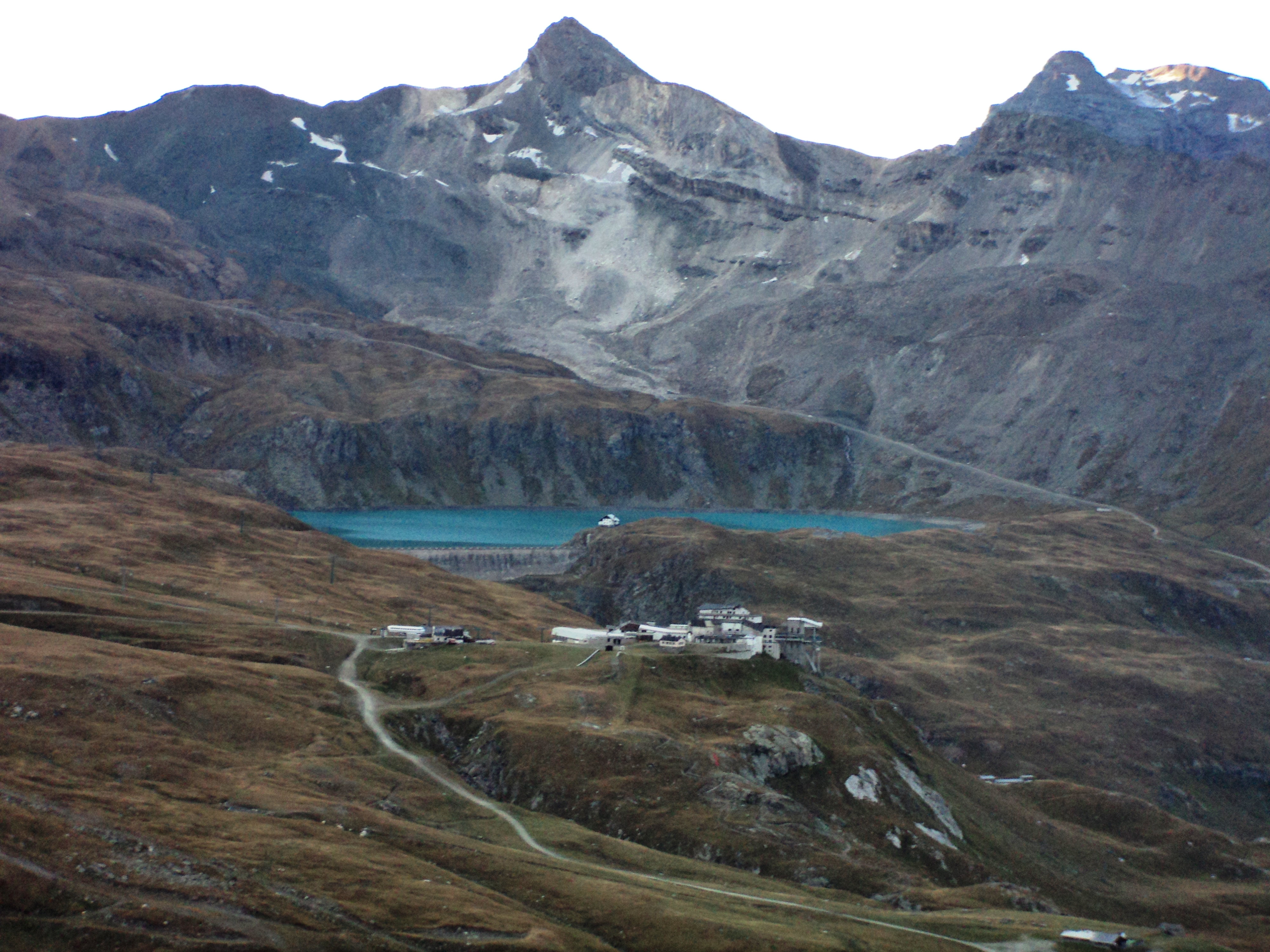 Il Lago Goillet e Plan Maison sopra Cervinia - Valtournenche